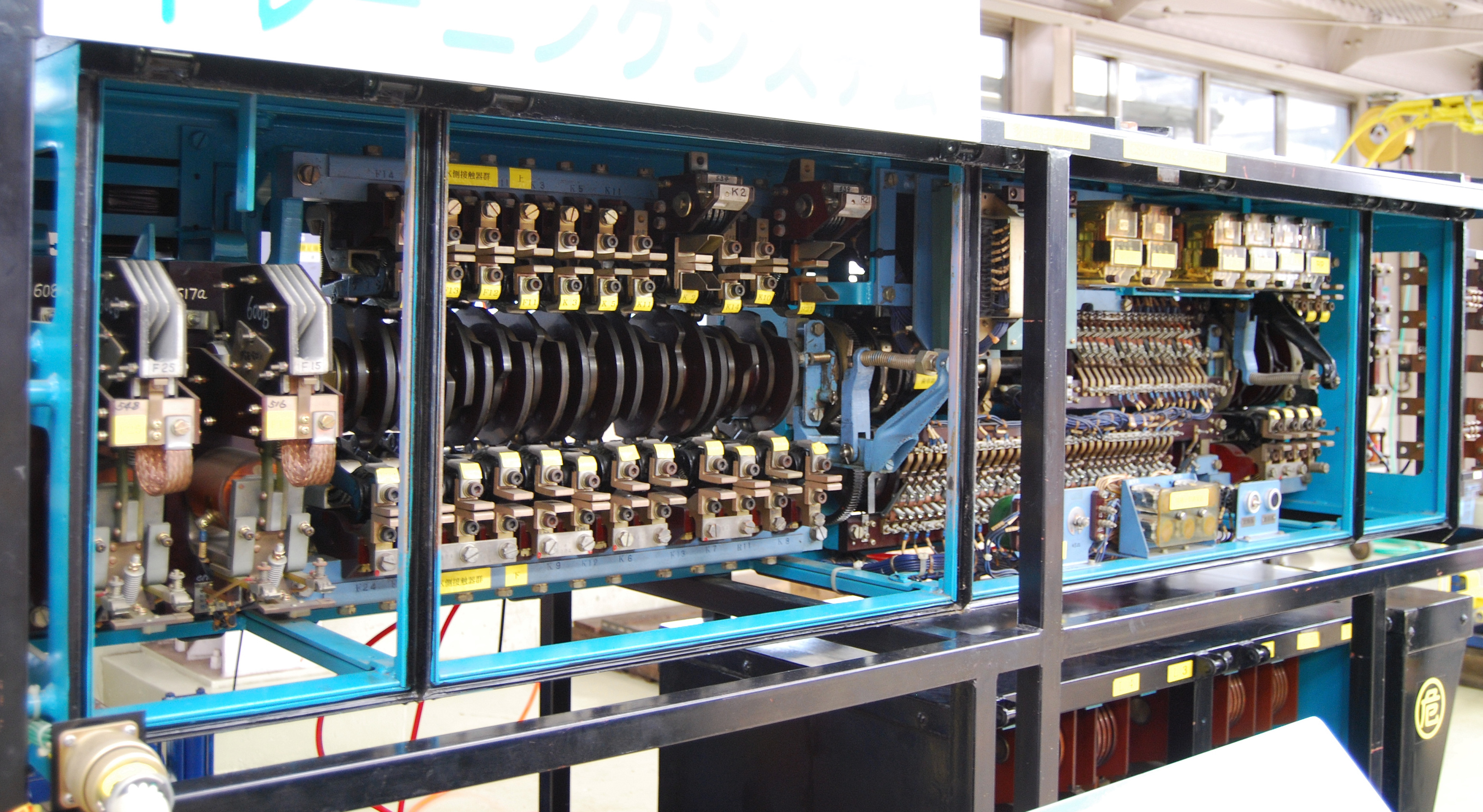 大宮総合車両センターにある103系電車に使用されていたトレーニング用のCS20形の主制御器（JRおおみや鉄道ふれあいフェアでの工場開放にて撮影）